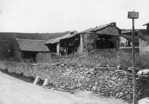 Vista parcial de Ger des de la carretera